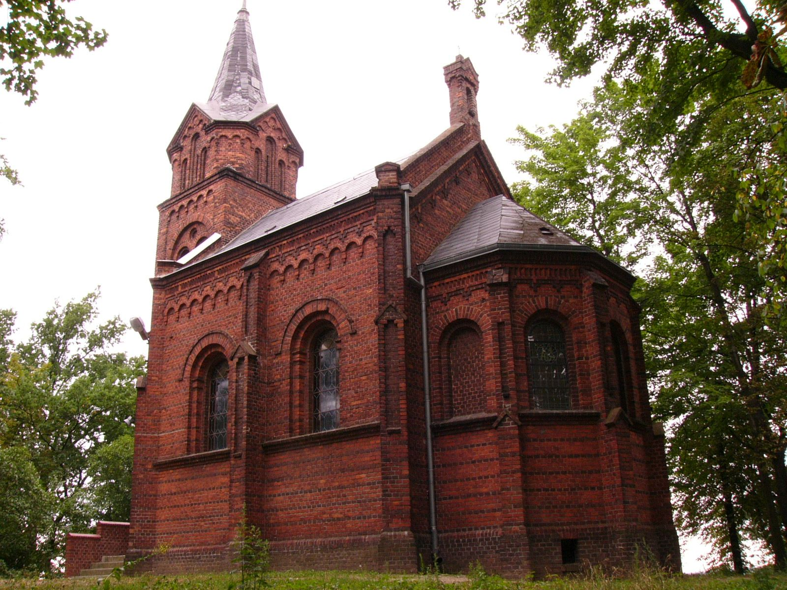 Neogotycki kościół pw. św. Wojciecha w Rojowie (Wielkopolska)